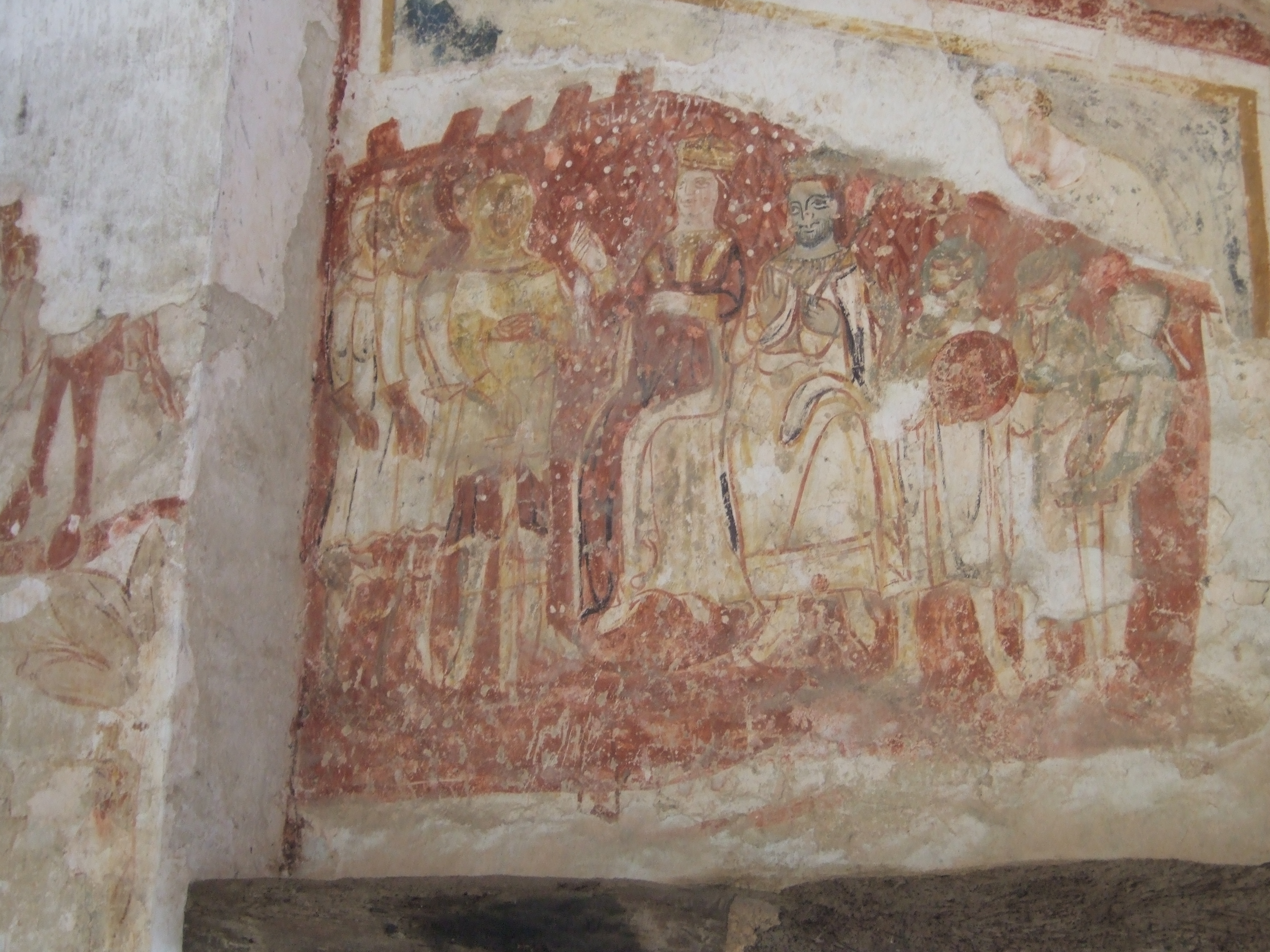 Abbazia di Sesto al Reghena